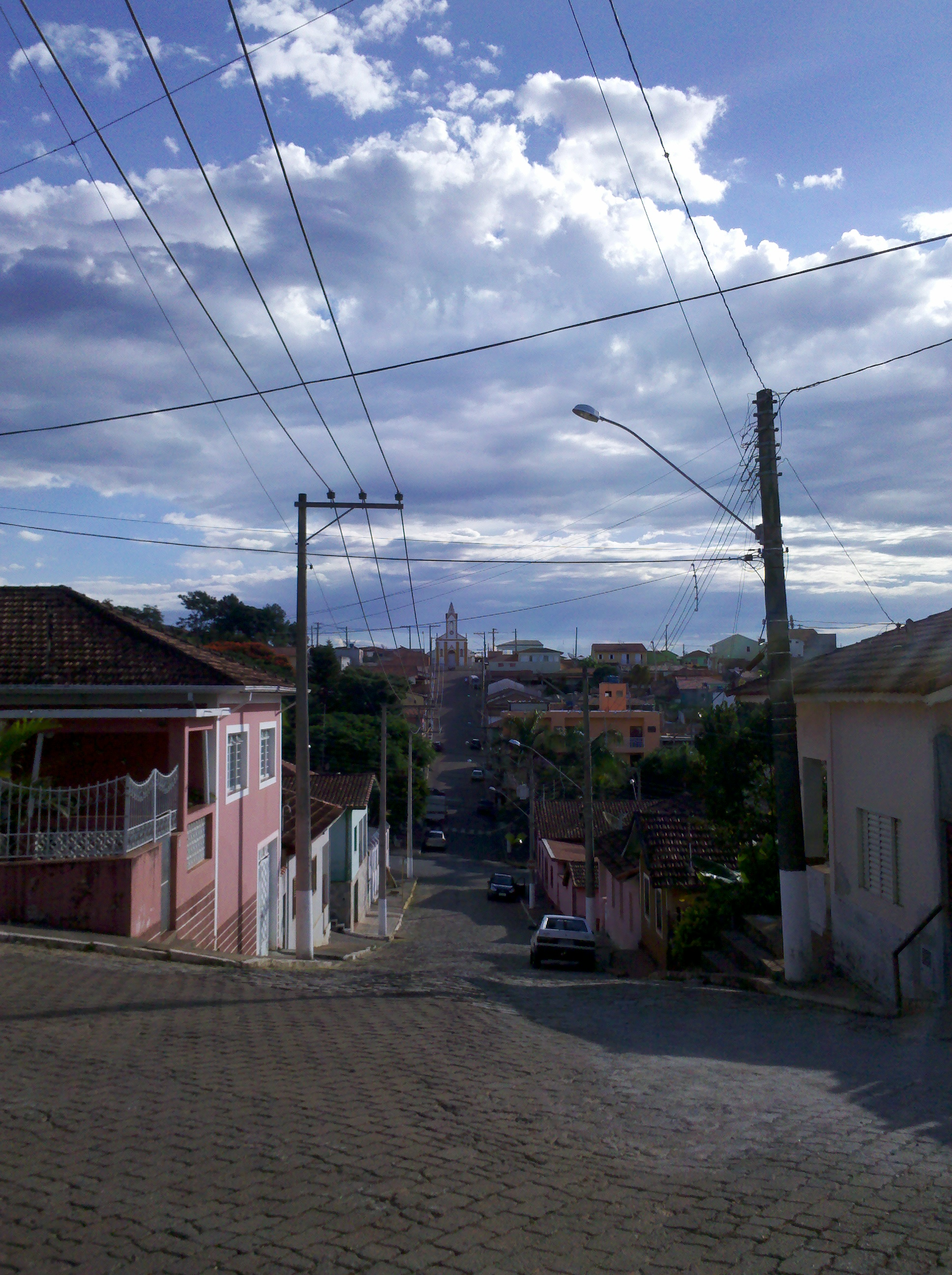 Lagoinha - State of São Paulo, Brazil